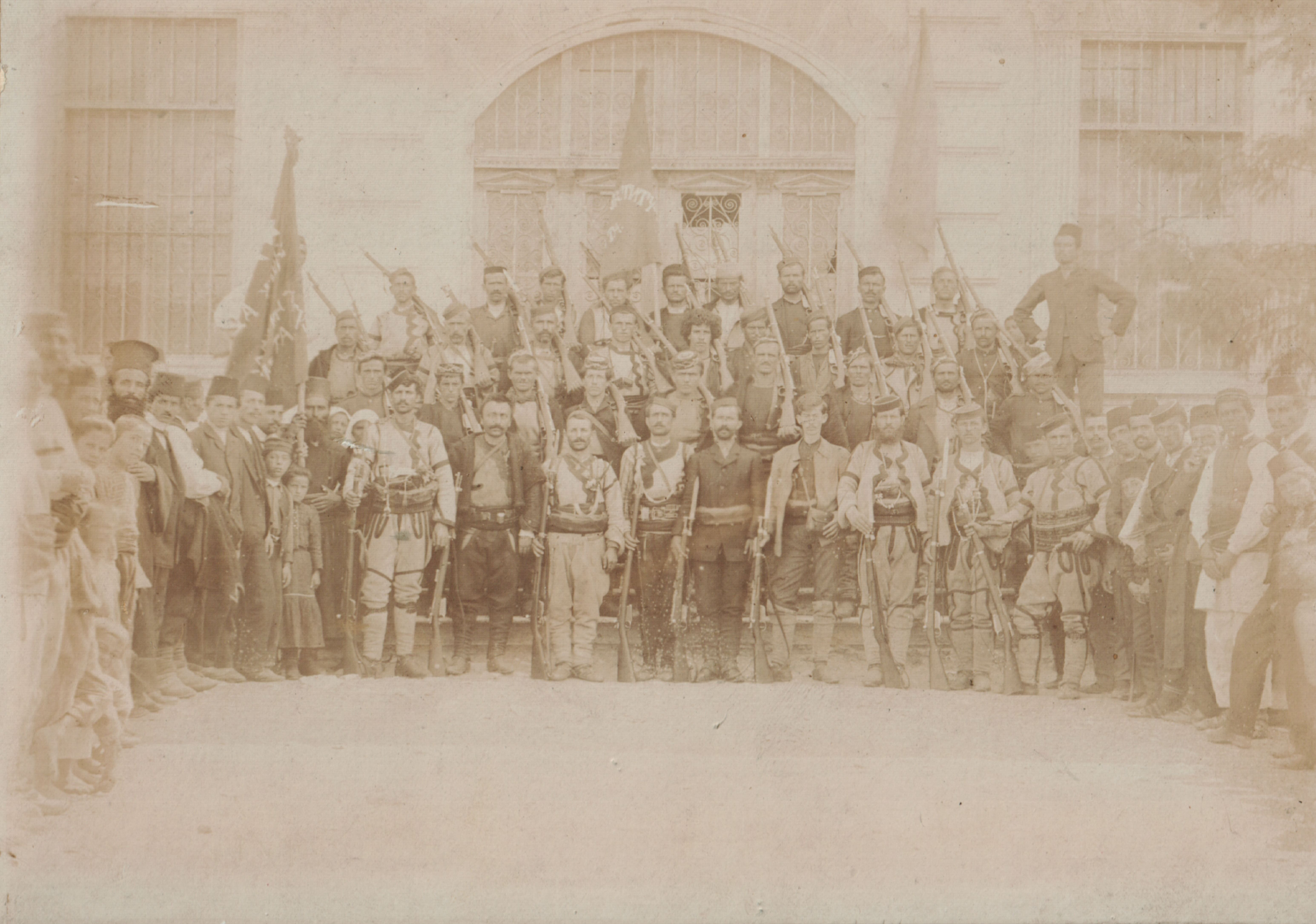 Български дейци в Охрид след Младотурската революция, 27 октомври 1908 г. На първия ред след попа със знамето Лазар Цириов, Гюрчин Петров, Божин Вълчев. Фото Коста Лещаров.